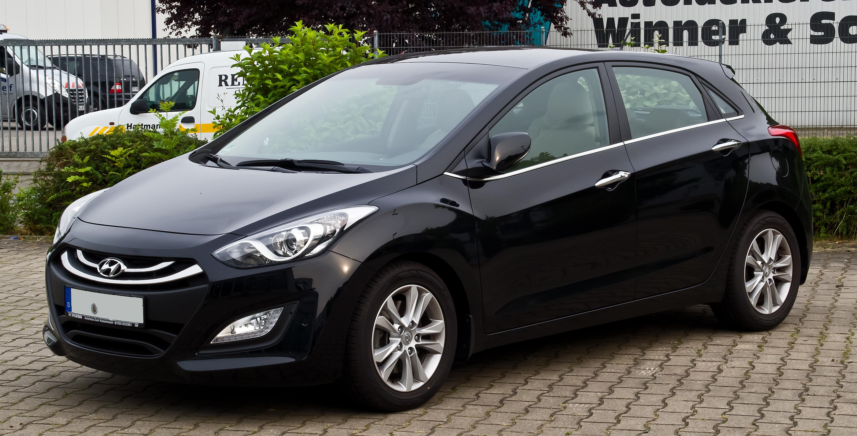 Hyundai i30 1.6 CRDi Style (II)